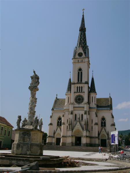 Kőszeg, Hungary